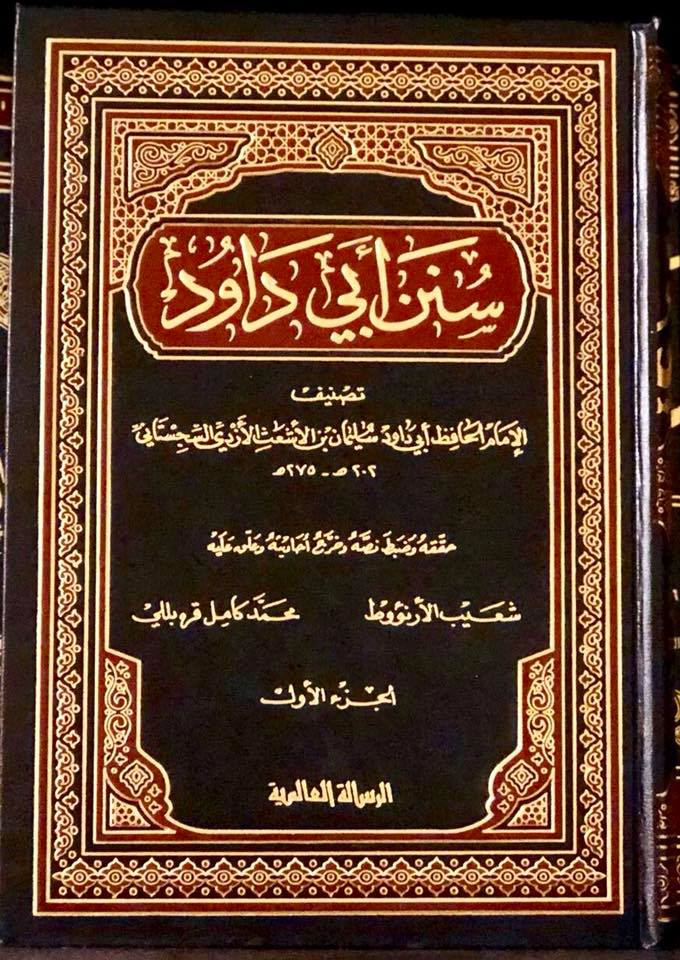 غلاف كتاب سنن أبي داود